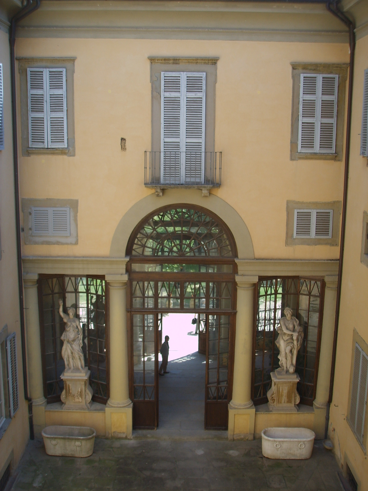 Palazzo Ximenes panciatichi da sangallo, cortile